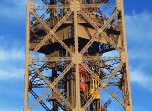 Torre Eiffel. Antigua plataforma entre los niveles 2 y 3.